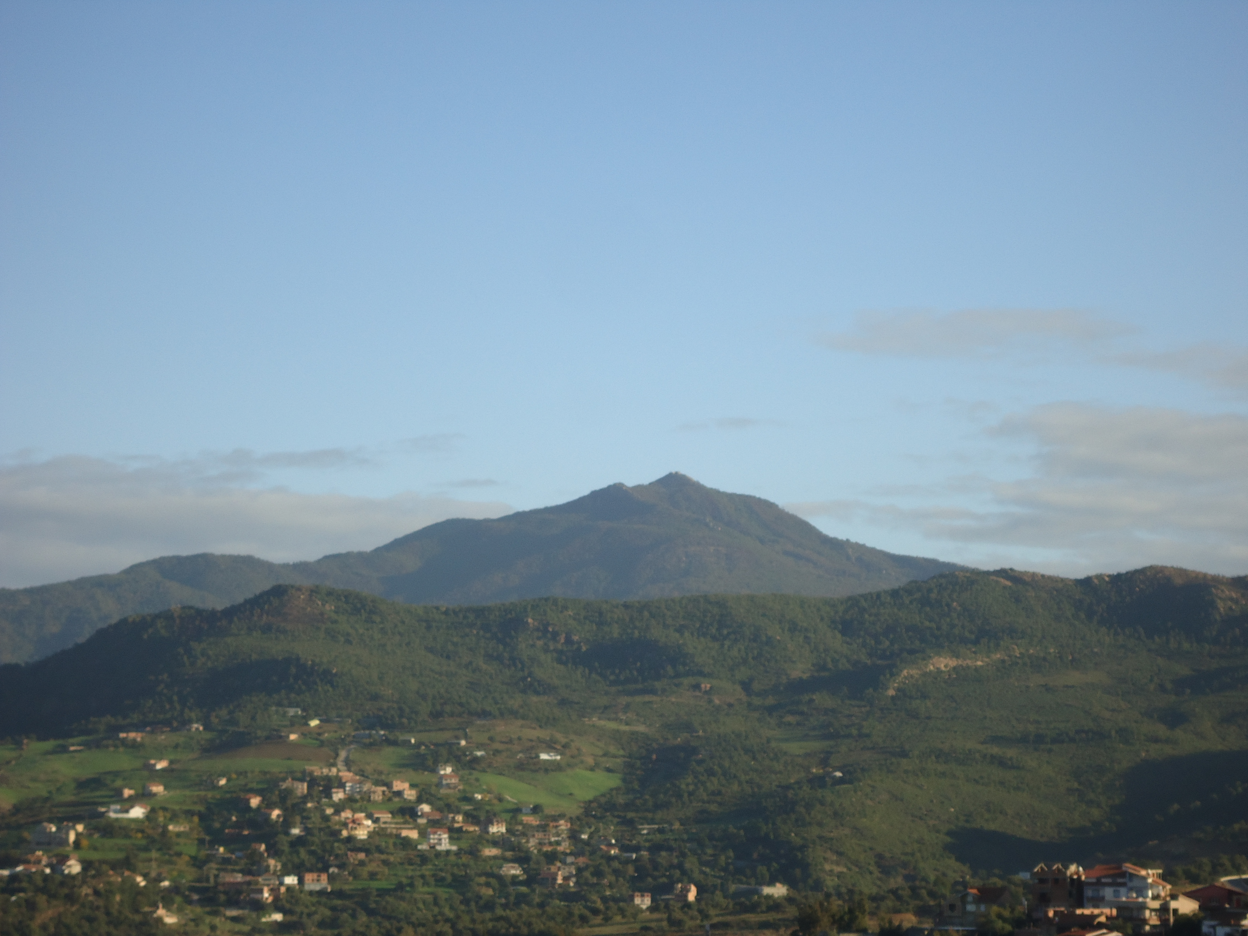 Vue sur le Mont Tamgout depuis Azazga.